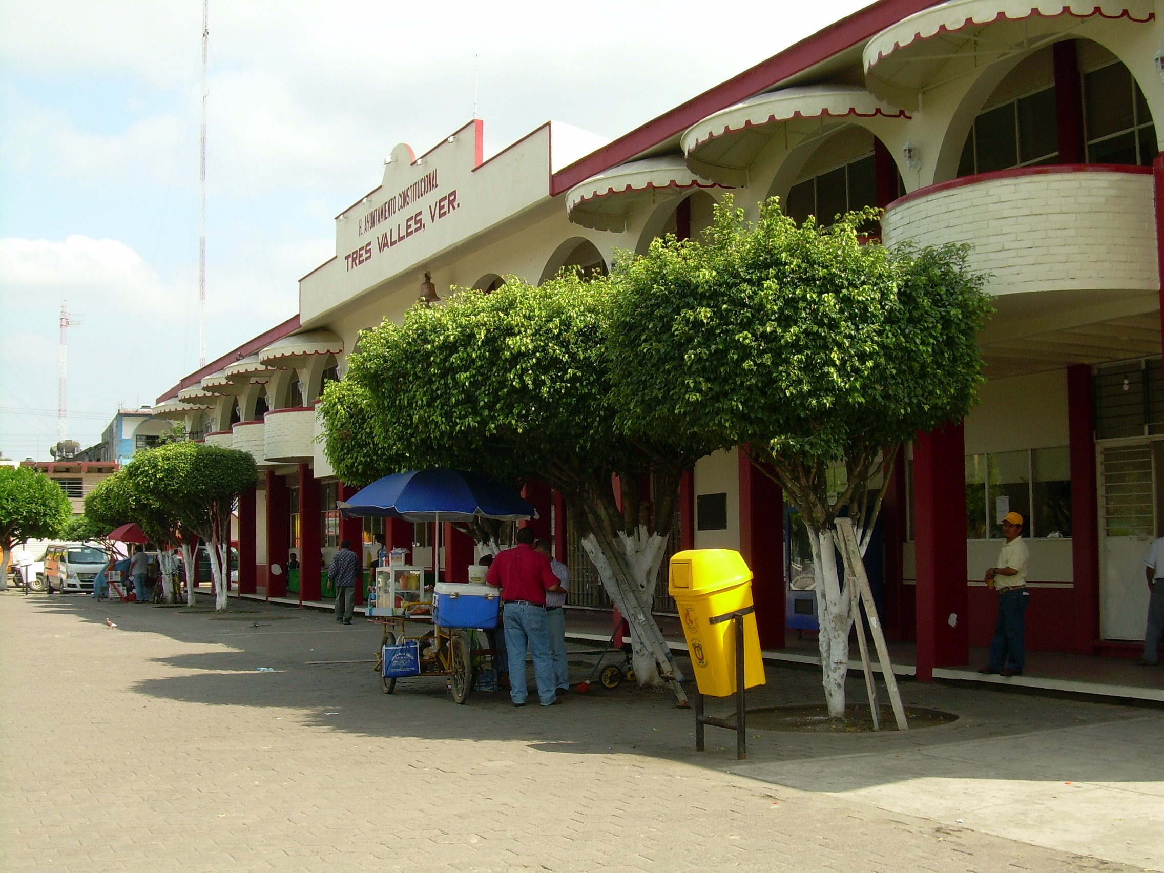 Toma lateral de la fachada del Palacio Municipal de Tres Valles, Veracruz, en la inmediaciones del zócalo, toma realizada desde la entrada de la iglesia localizada exactamente atrás de la posición de la cámara